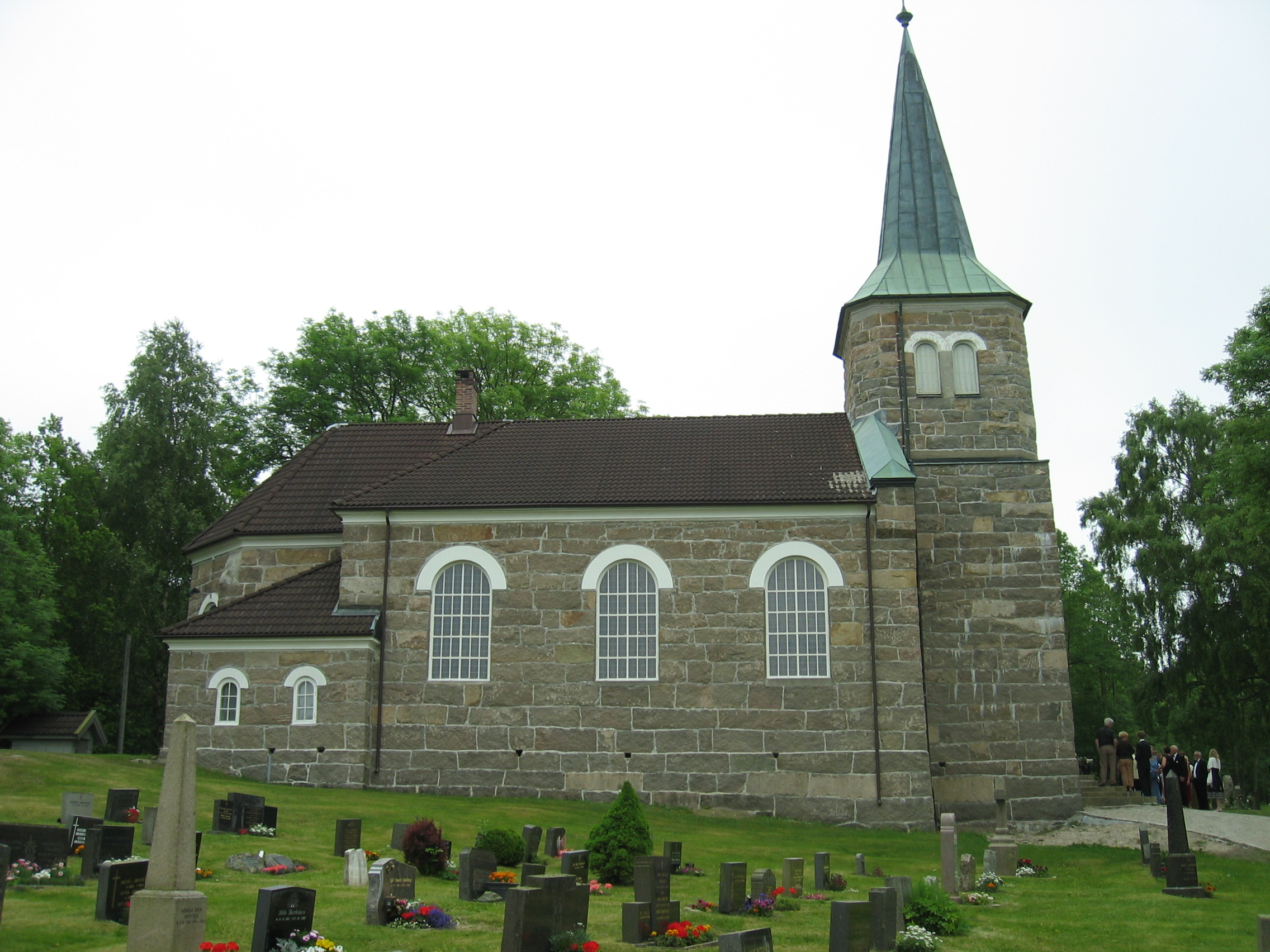 Spjærøy kyrkje, Hvaler, Østfold, Norway. Picture taken by PerPlex 17 June 2006.